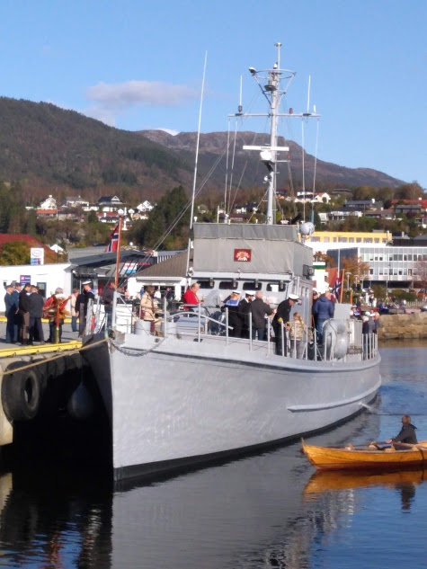 KNM Hitra ved kai.